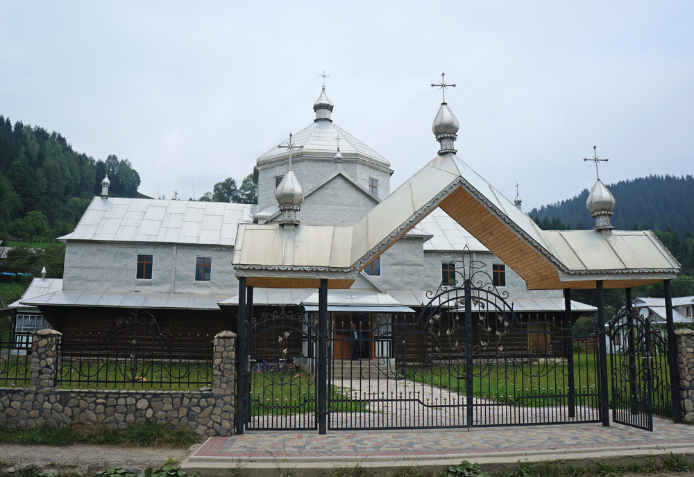 Михайлівська церква (дер.), с. Довгопілля Фото: ВздовжКарпатська Експедиція 27.07-28.08.2013